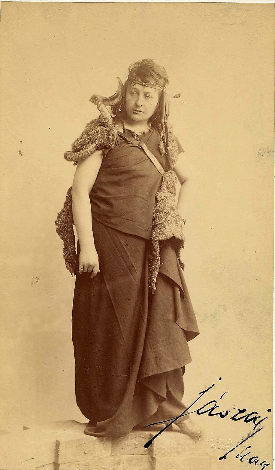 Grillparzer, Franz: Medea; Társulat: Nemzeti Színház, Budapest; Bemutató: 1887.11.04; Szereplők: Medea: Jászai Mari; Felvétel ideje: 1887; Technika: Matt albumin, Névaláírás a képes oldalon